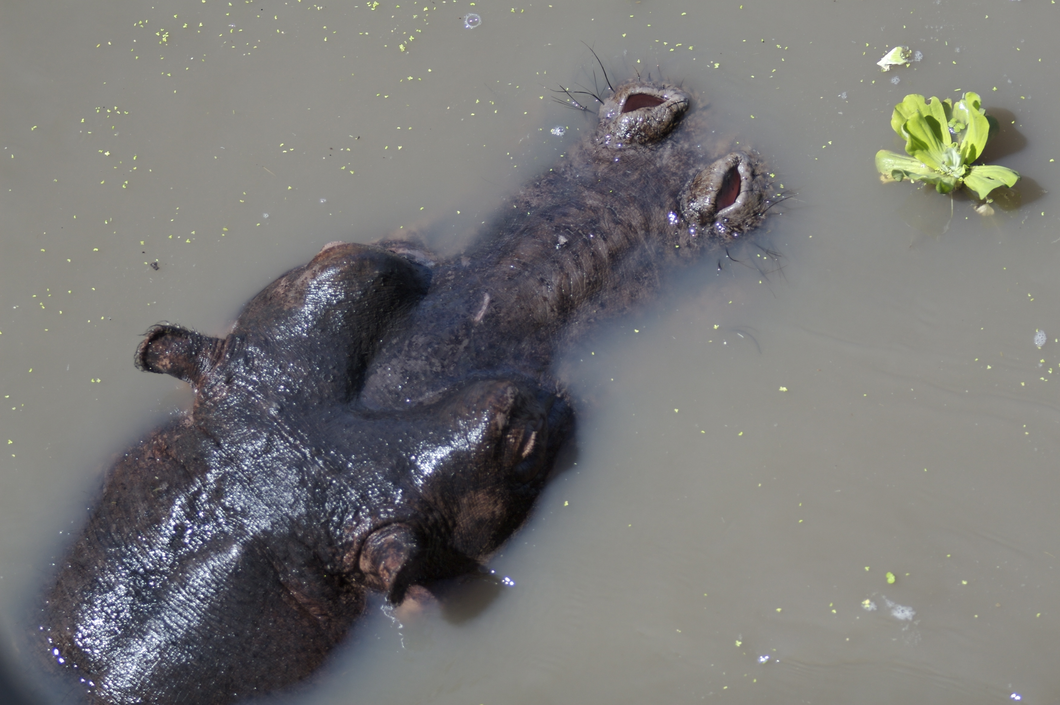 Hippopotamus in Katavi river, Tanzania